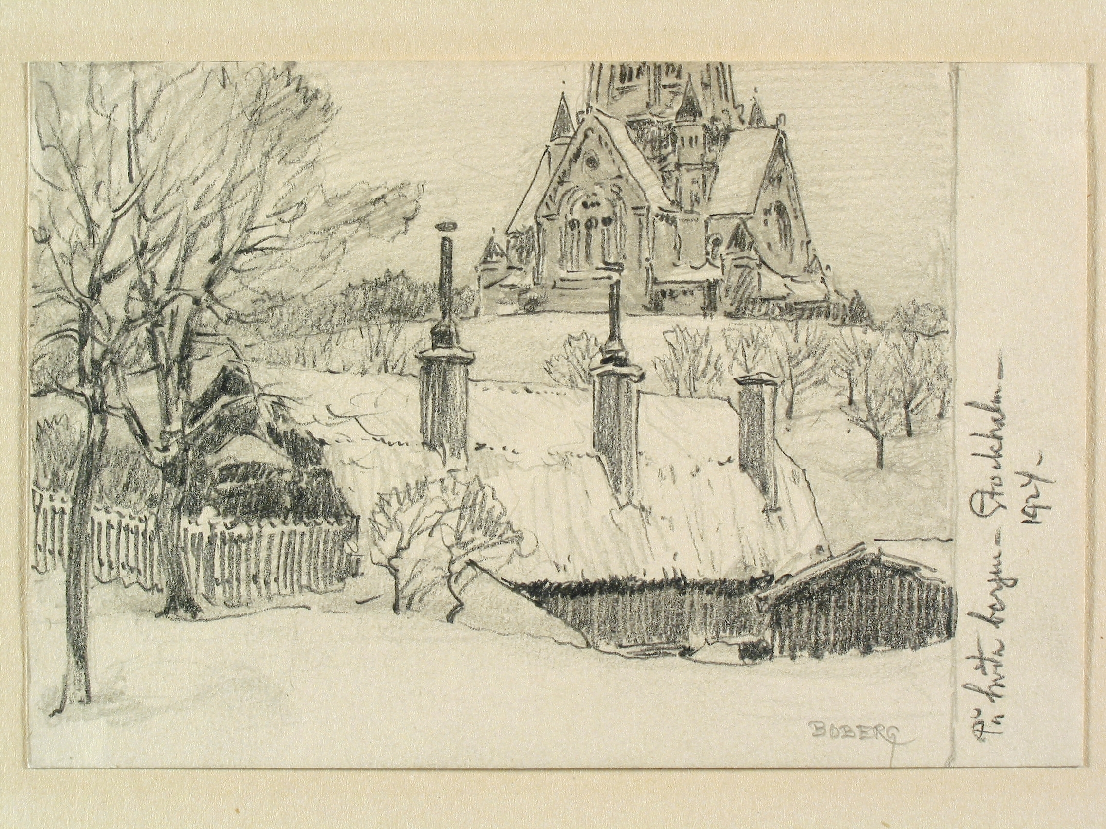 "På Hvita Bergen 1924", Stockholm, Södermalm, Vita bergen, bebyggelse och Sofia kyrka i Bakgrunden. Teckning av Ferdinand Boberg. Depicted place: Söder, Vita bergen (Ortnamn därutöver), Stockholm County (Q104231)